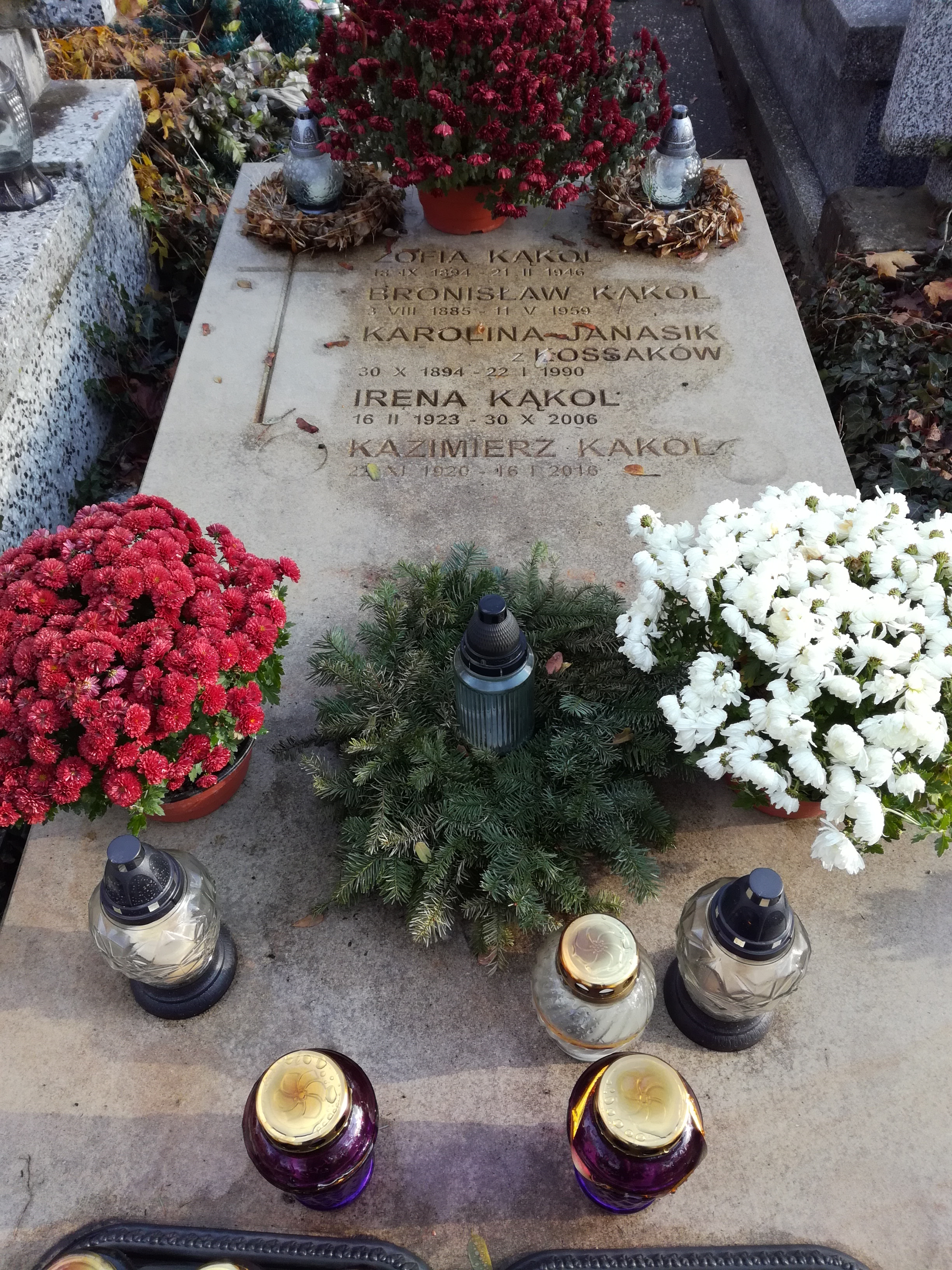 grób Kazimierza i Ireny Kąkolów na Cmentarzu Bródnowskim